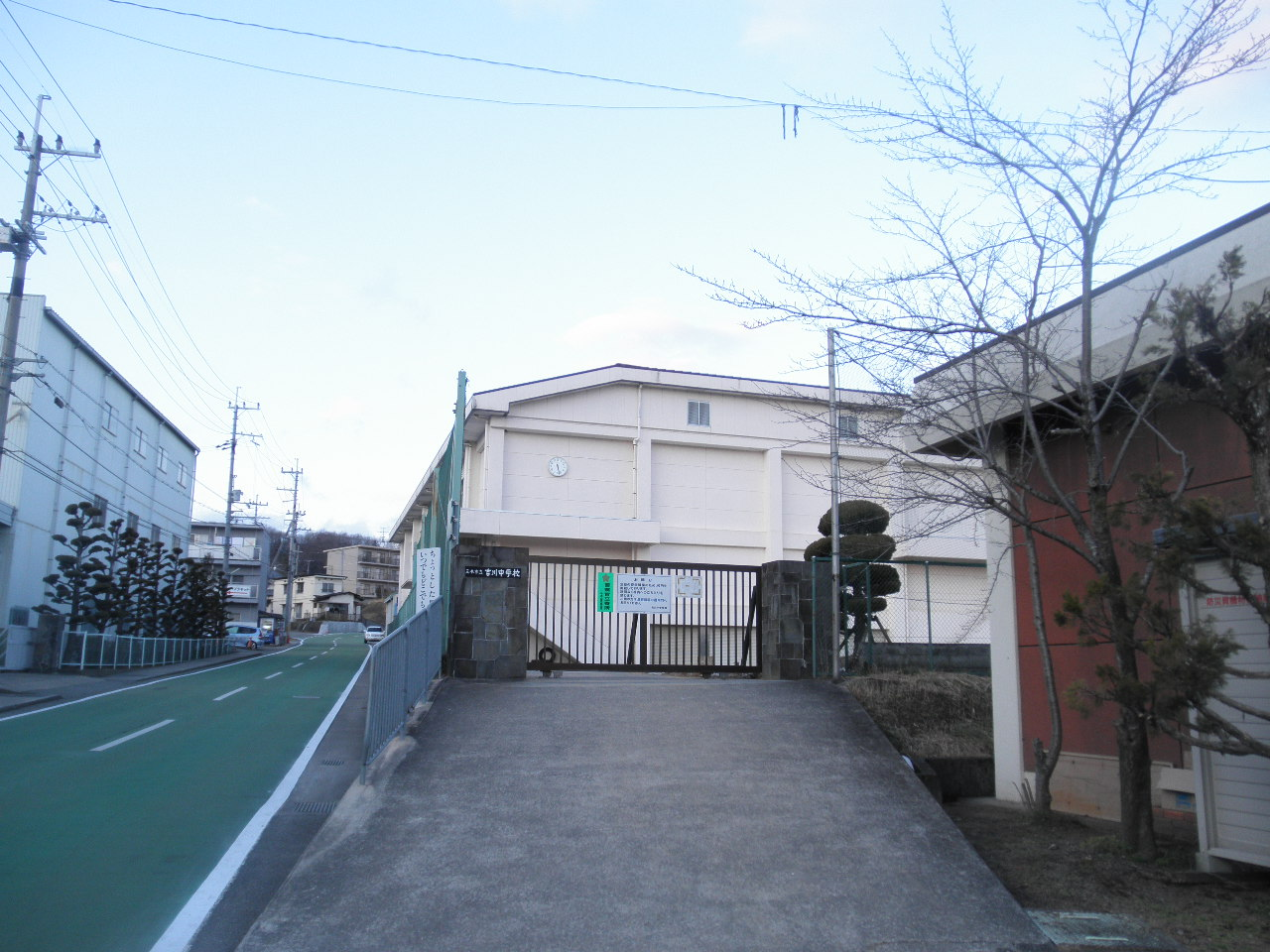 三木市立吉川中学校